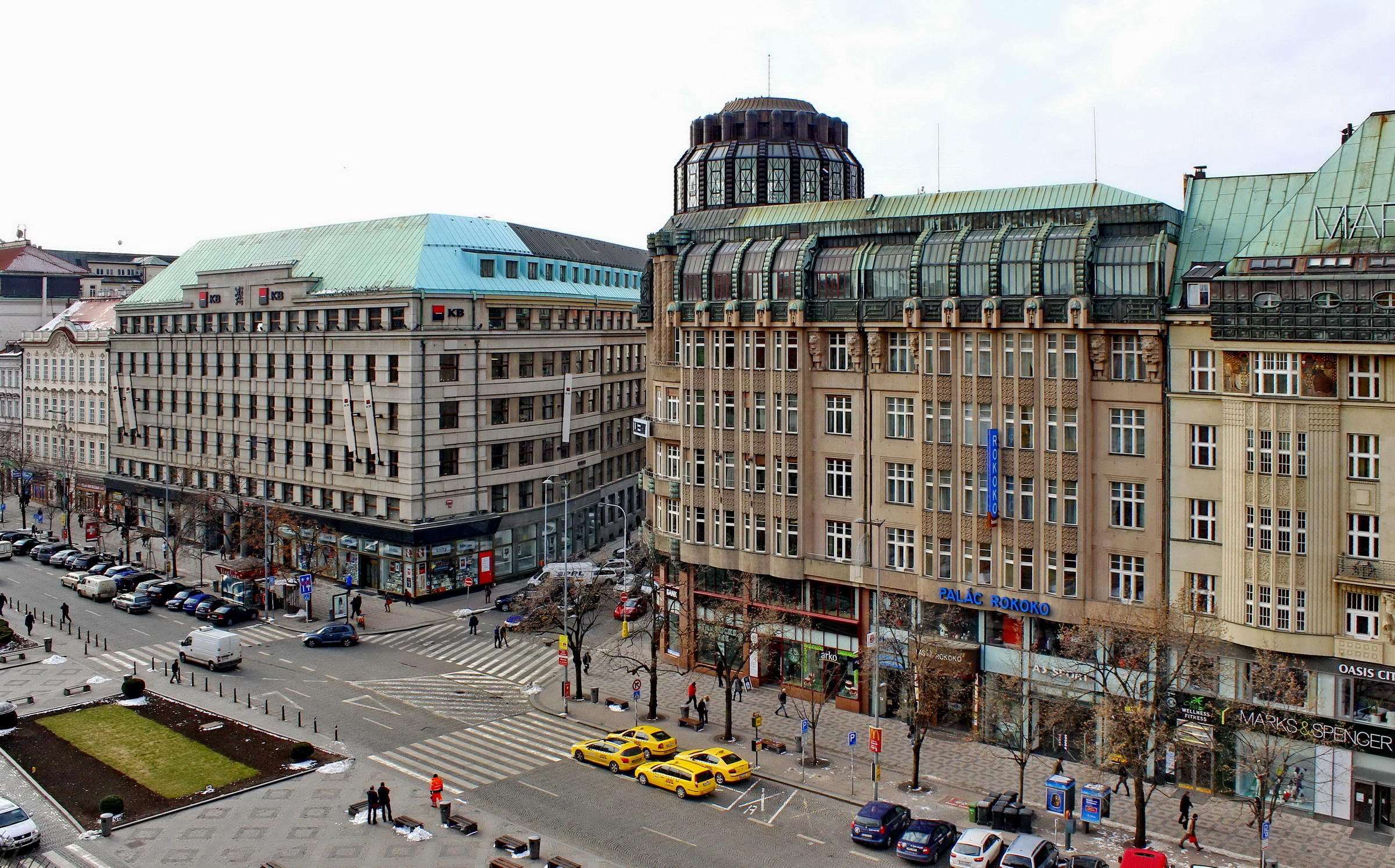 Praha 1 – Nové Město. Vlevo: František Roith: Šekový úřad, poštovní spořitelna, dnes Komerční banka, čp. 796, Václavské náměstí 42 – 46, 1924 – 1927, vpravo: Emil Králíček: Palác Rokoko (Šupichovy domy), čp. 794, 626, Václavské nám. 38 – 40 1911 – 1919